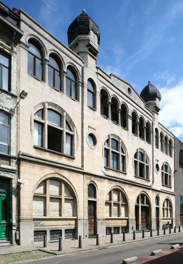 Antwerpen Oostenstraat 43-45